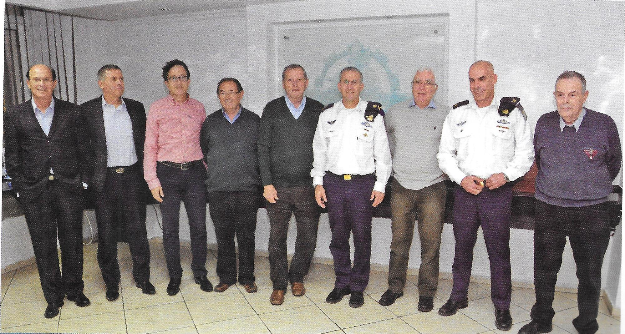 מפגש מפקדי מספן הציוד 29 דצמבר 2013